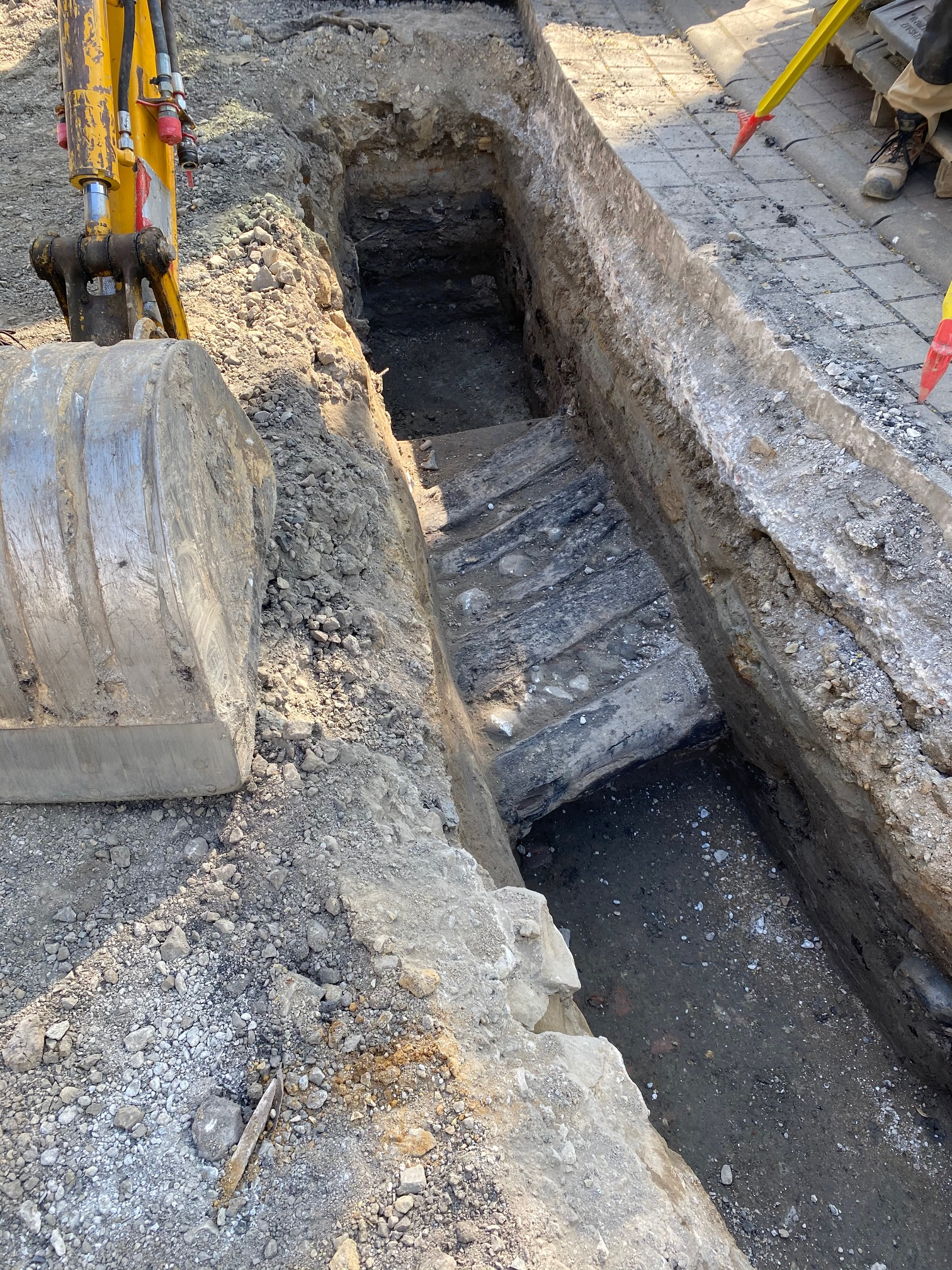 Ausgrabung bei der Sanierung der Hauptstraße im Ortskern von Wennigsen, Gemeinde Wennigsen (Deister). Historische Brücke vor der Einmündung Sorsumer Straße, Degerser Straße, Hauptstraße.